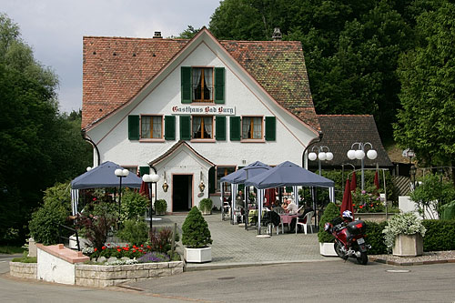 Gasthaus Bad Burg